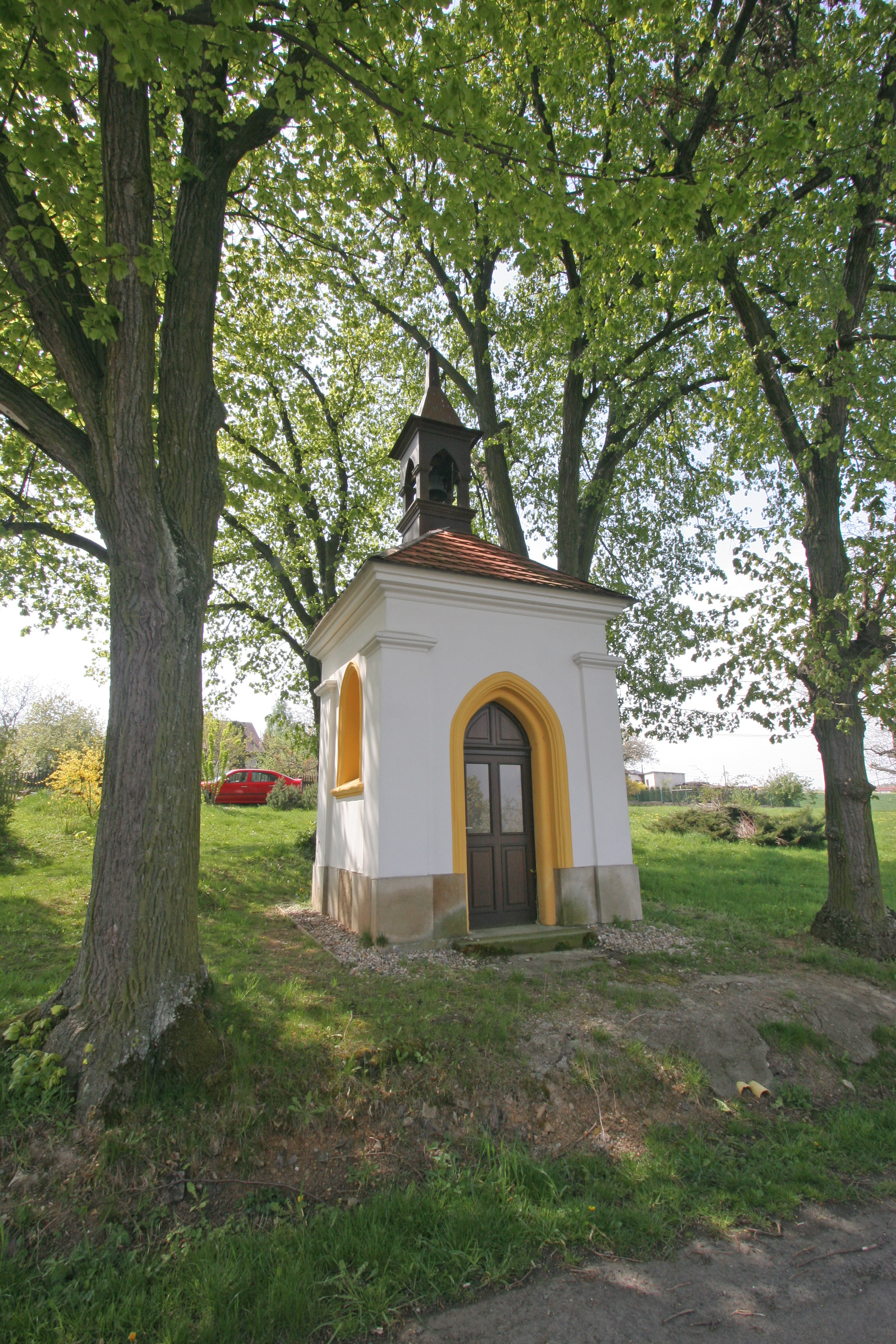 Úherčice kaple Panny Marie